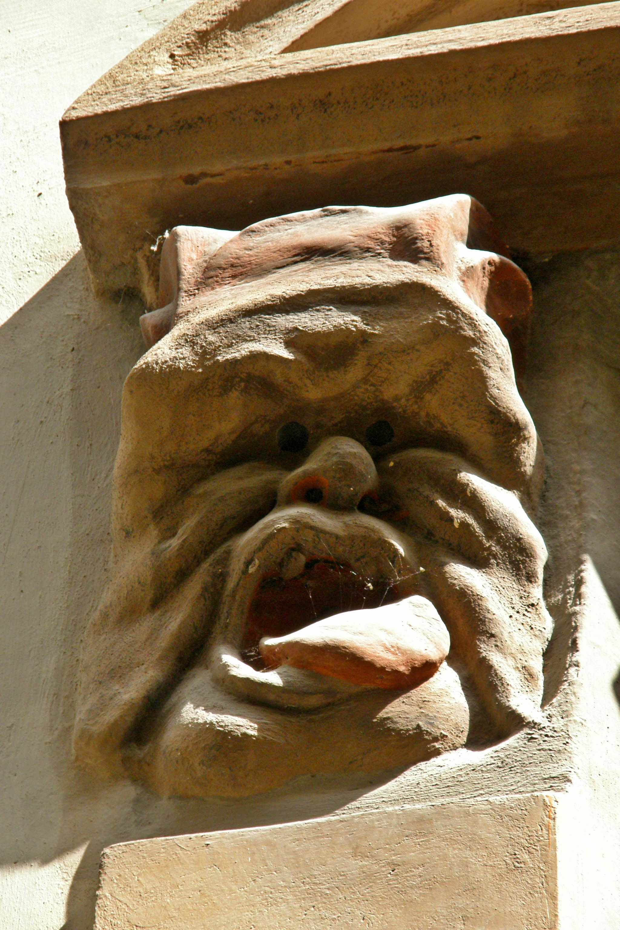 Maison Fabri (détail de la façade) 39 rue Longue, Saint Étienne de Tinée, Alpes Maritimes, France.